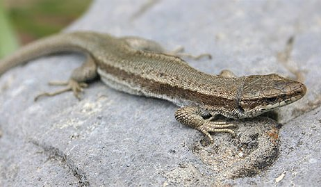 Lezard des Pyrénées, Parc National d'Ordesa, Espagne